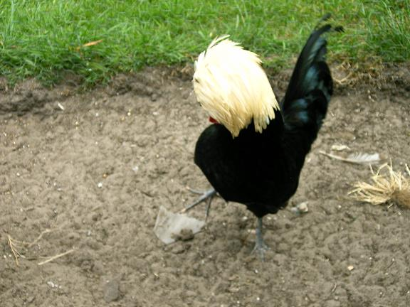 Kuifhoender haan zwart-witkuif.